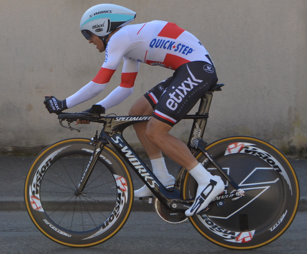 Michal Kwiatkowski à Paris-Nice 2015